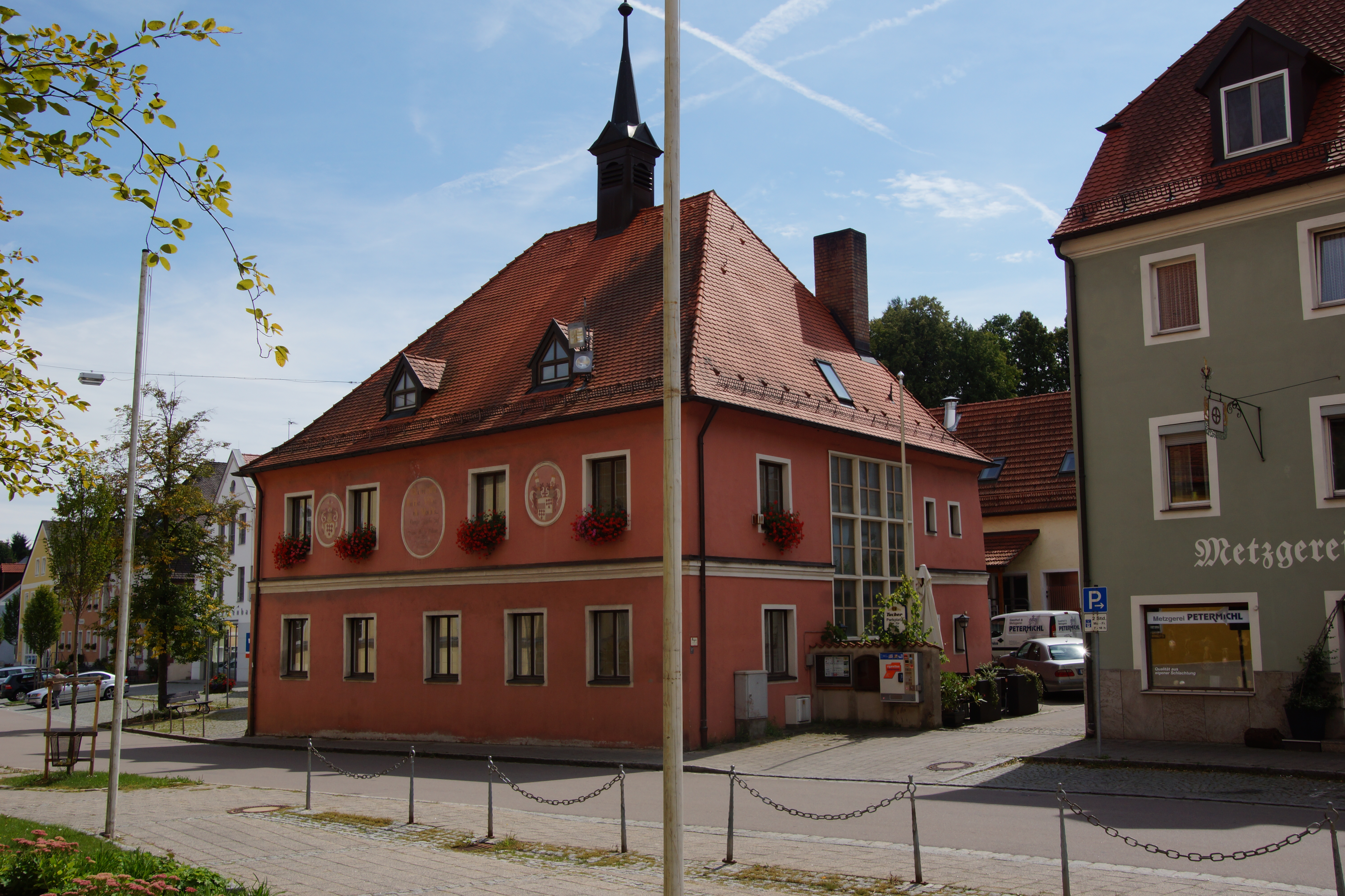 Der Markt Beratzhausen in der Oberpfalz